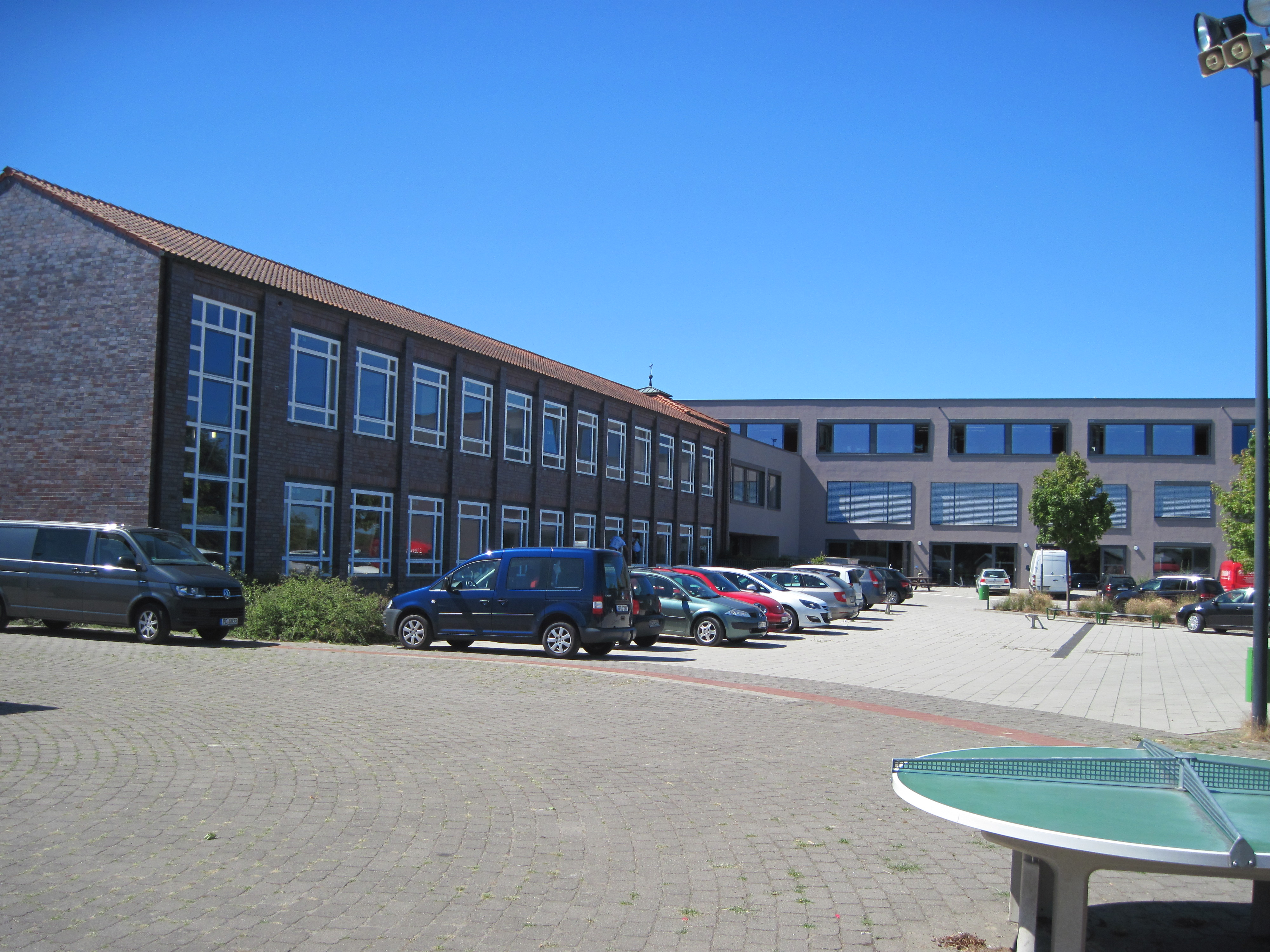 IGS Sassenburg: Links der Altbau + Rechts das 1.Neubau-Gebäude mit der Mensa. Der Schulhof im Vordergrund während der Schulferien